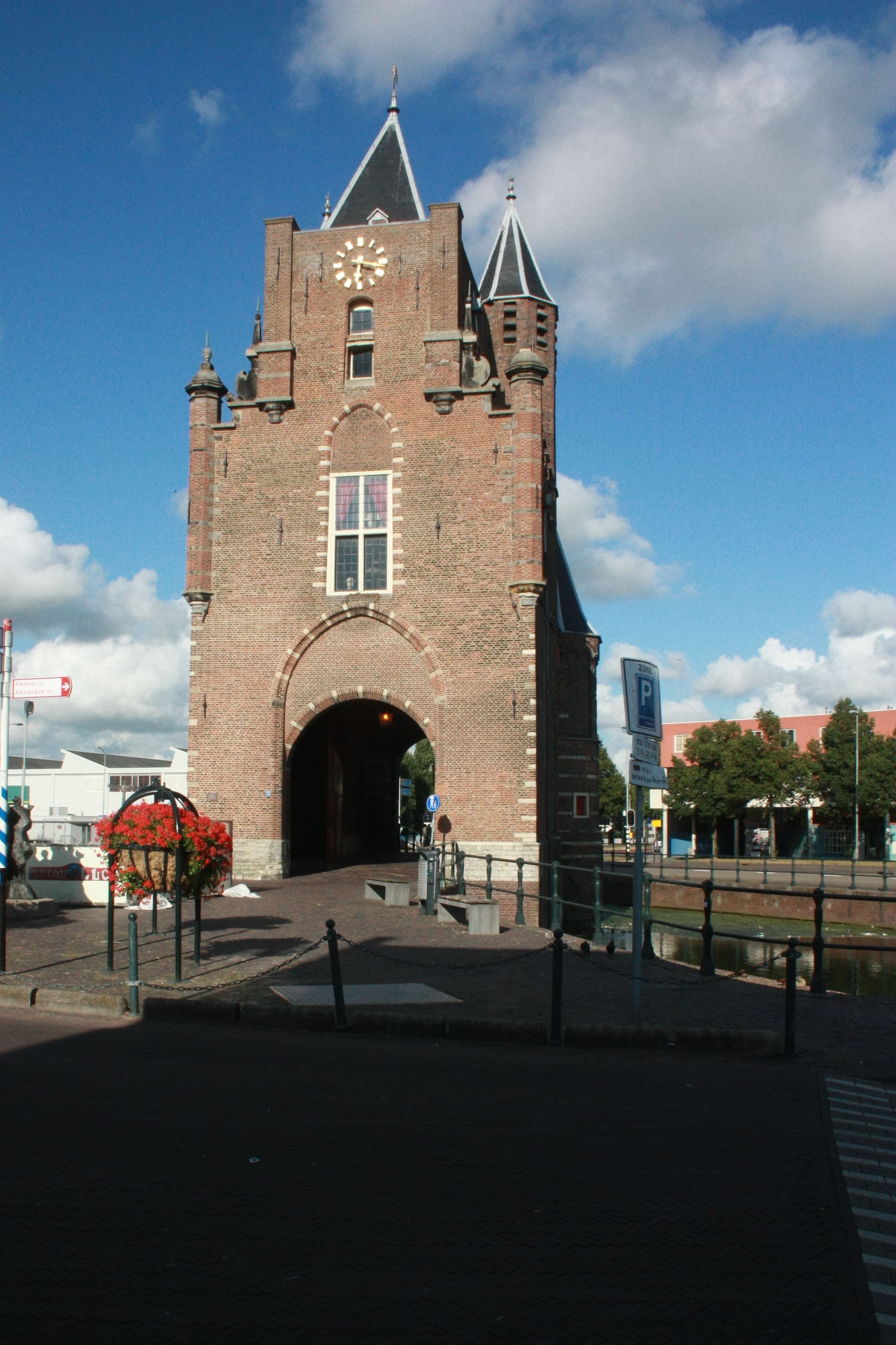 Haarlem, Amsterdamse Poort